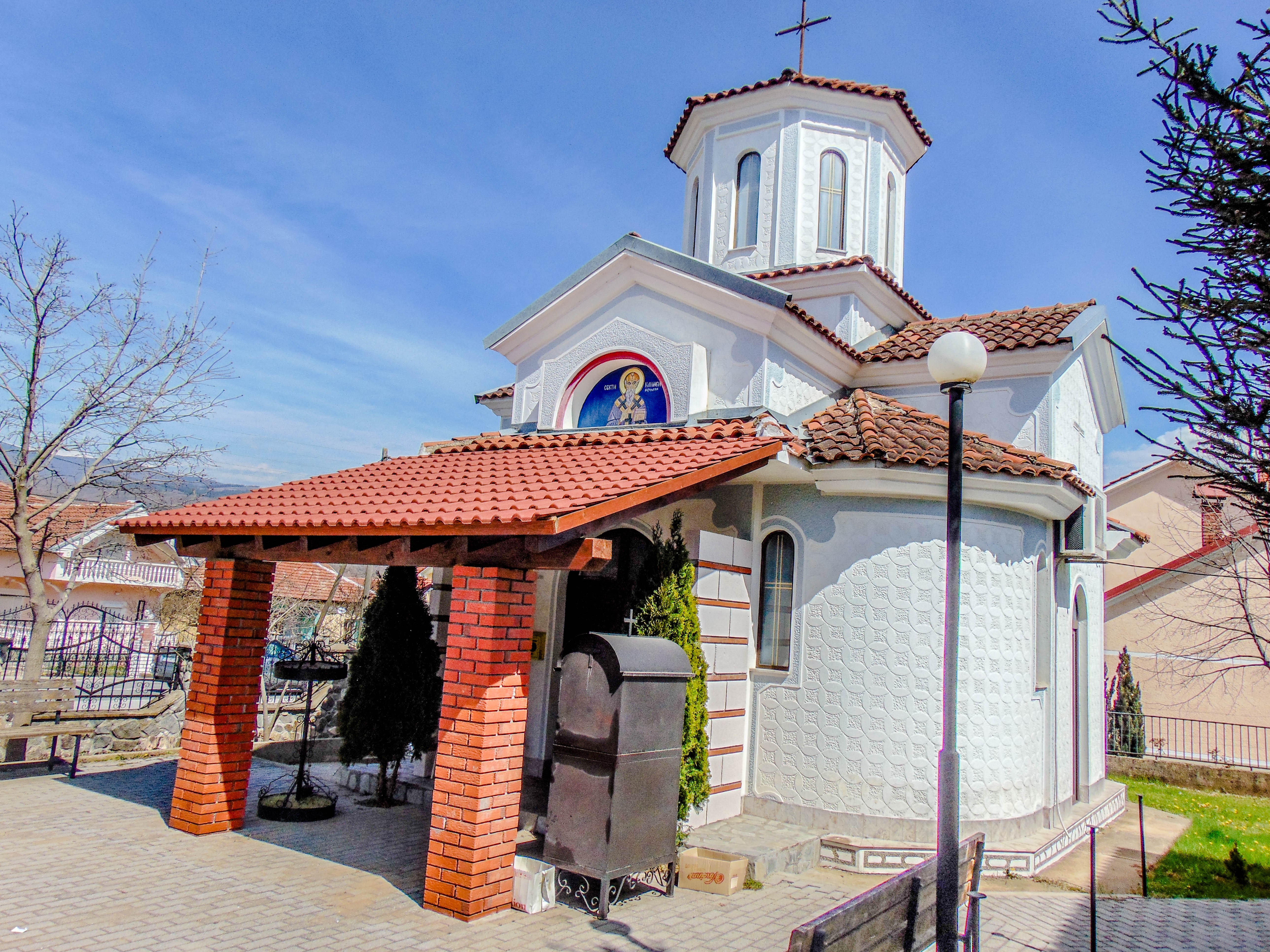 Црква „Св. Климент Охридски“ - Ново Коњарево